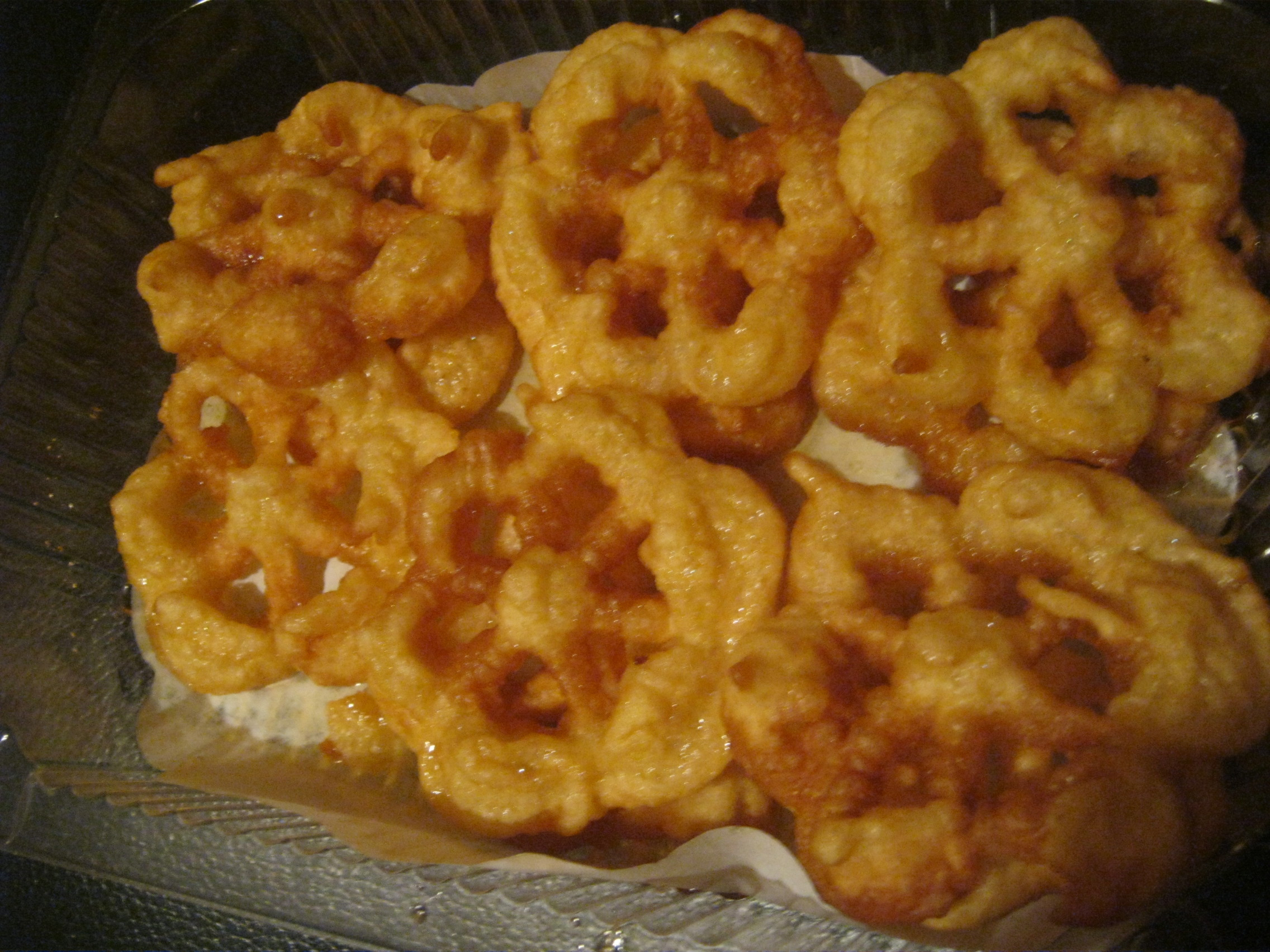 Žagarėliai